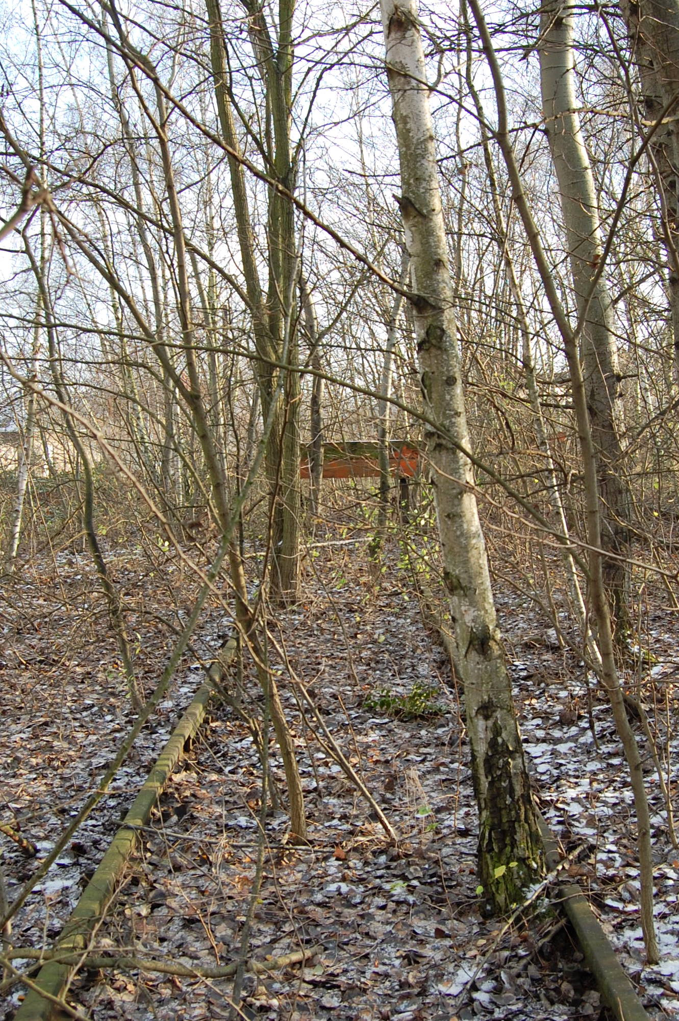 zugewachsenes Gleis auf dem Güterbahnhof Magdeburg Südost